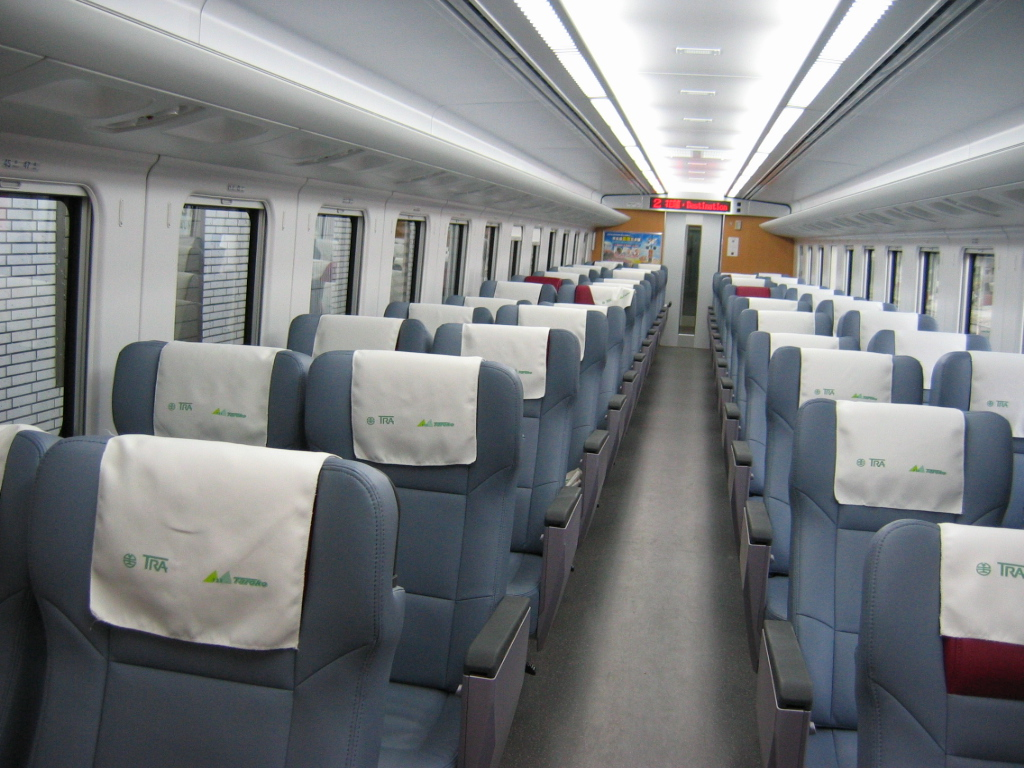 中文（台灣）: 臺灣鐵路管理局TEMU1000型電聯車客室剛引進時的內裝，使用皮椅。